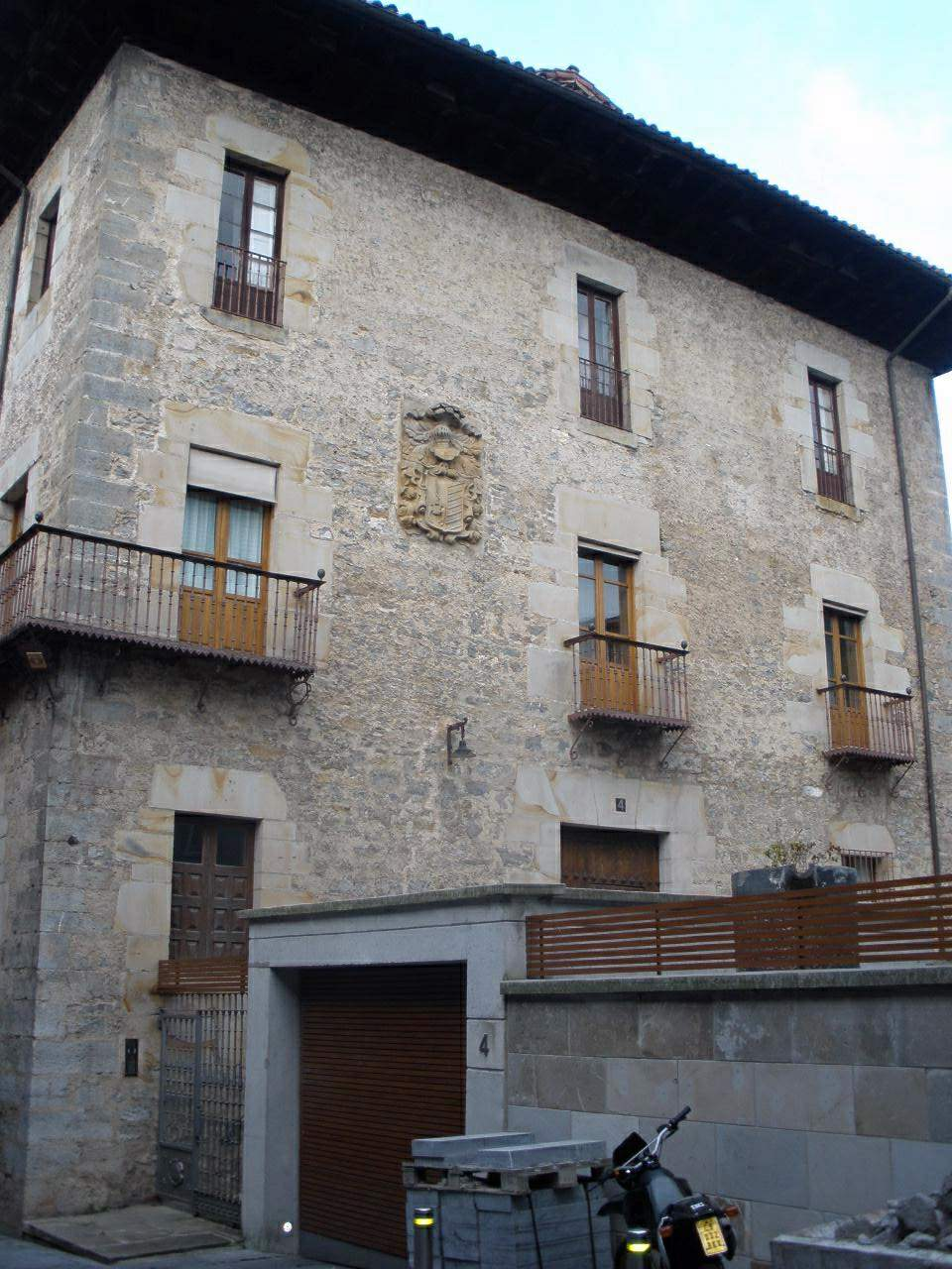 Bergara (Gipuzkoa)